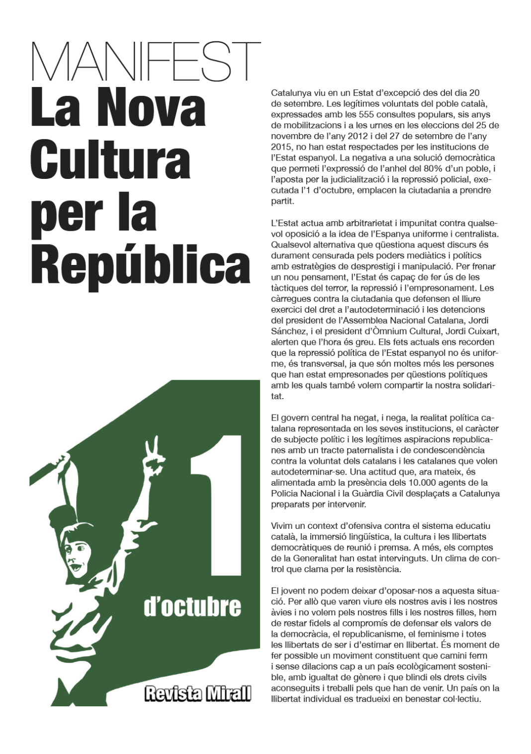 Manifiesto de la Revsta Mirall por la República